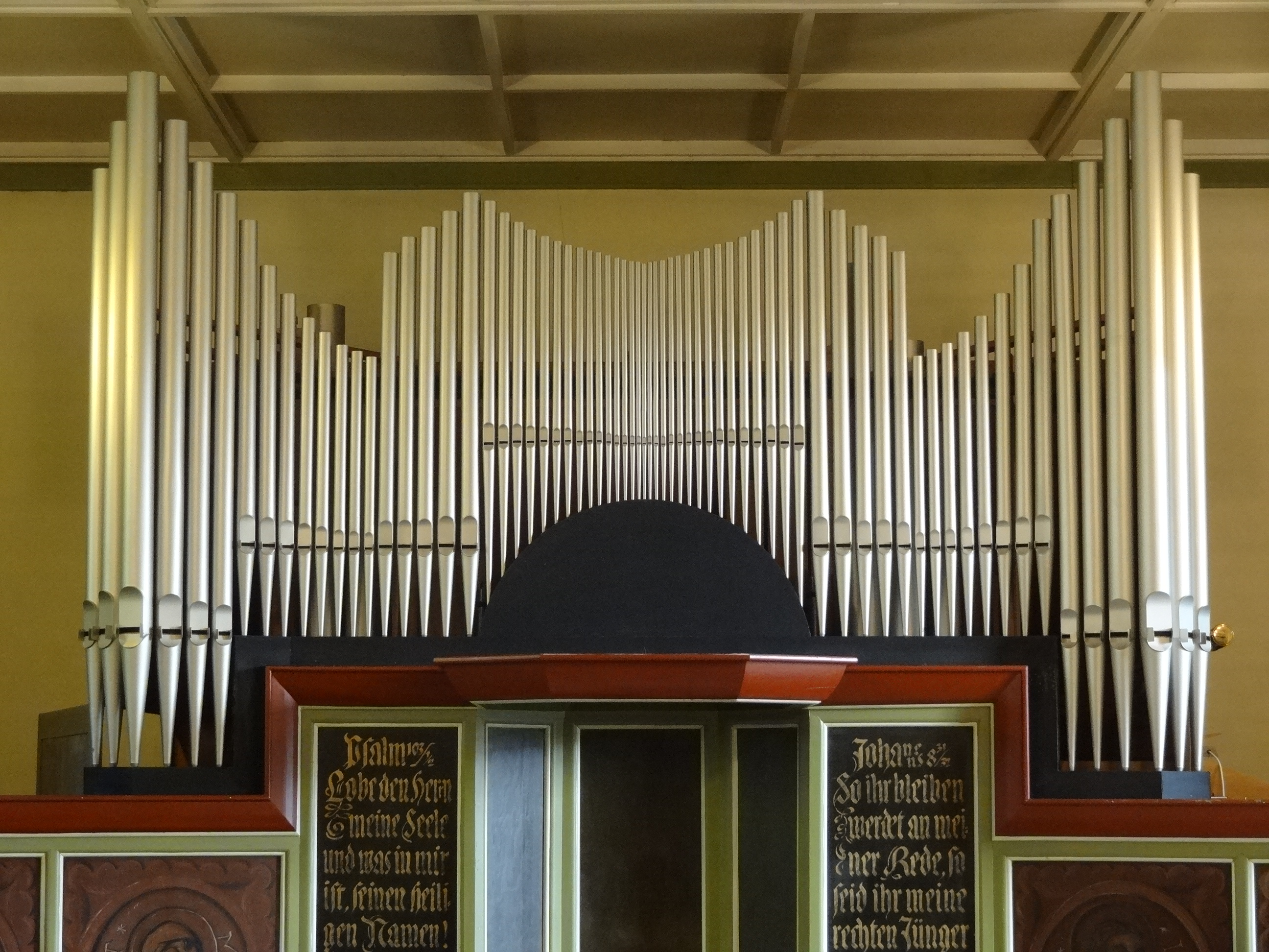 Evangelische Kirche Weickartshain